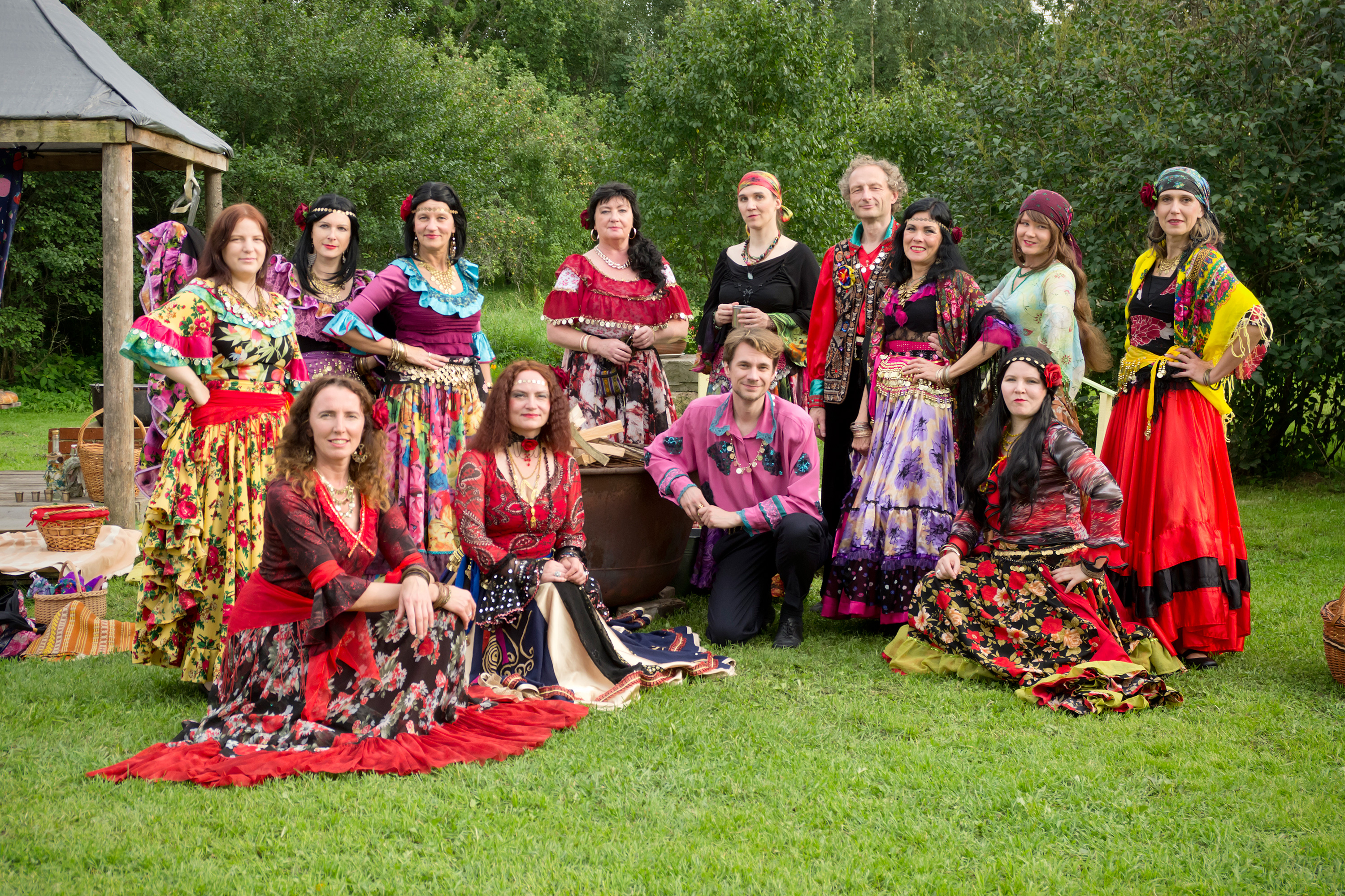 Mustlastantsuansambel Maljarka Alle-Saija teatritalus. Ühispilt enne etendust “Khelesa, romale”.